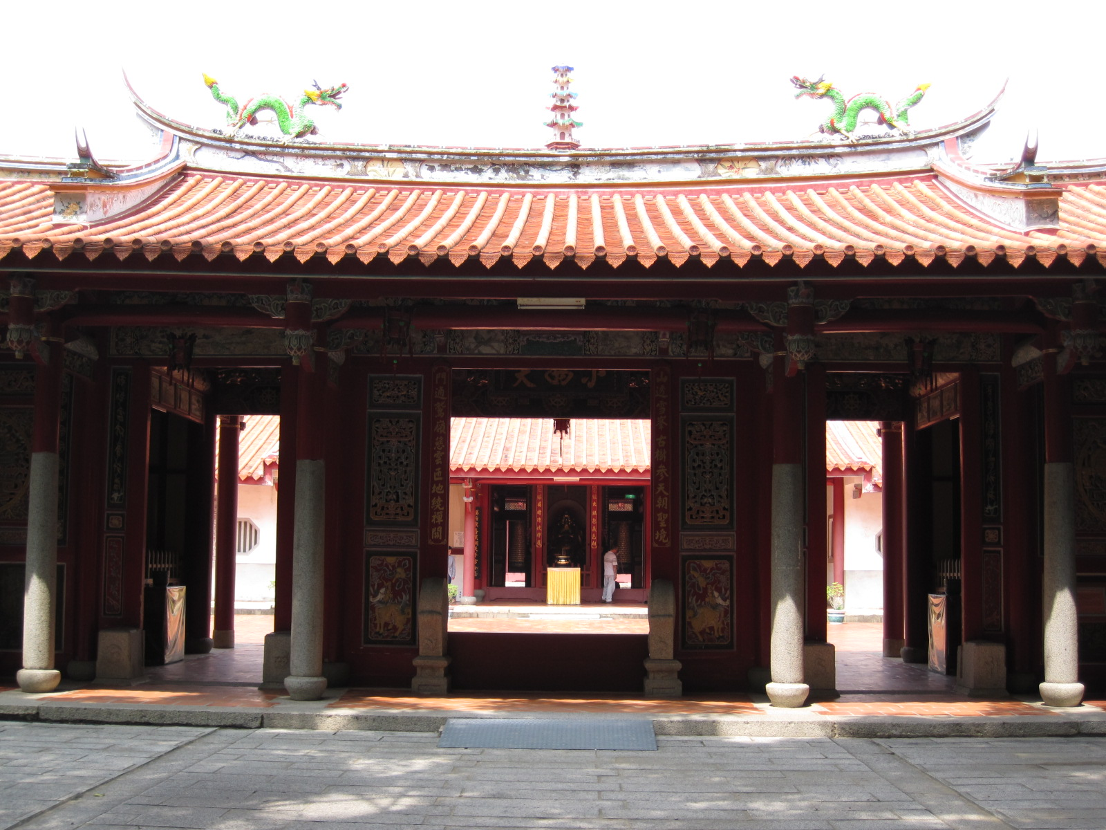 臺南開元寺的三川門